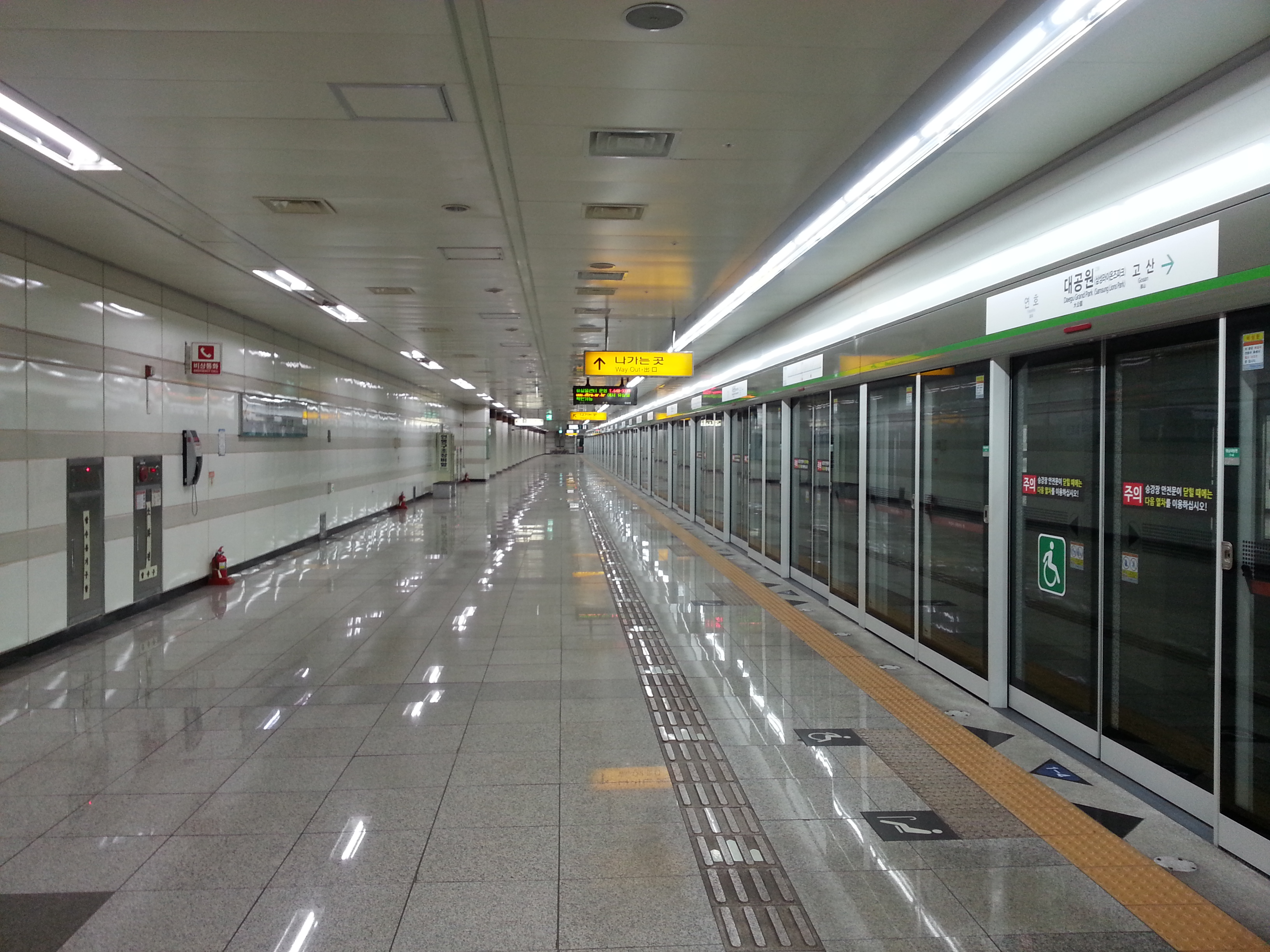 대구 도시철도 2호선 대공원역 영남대 방면 승강장